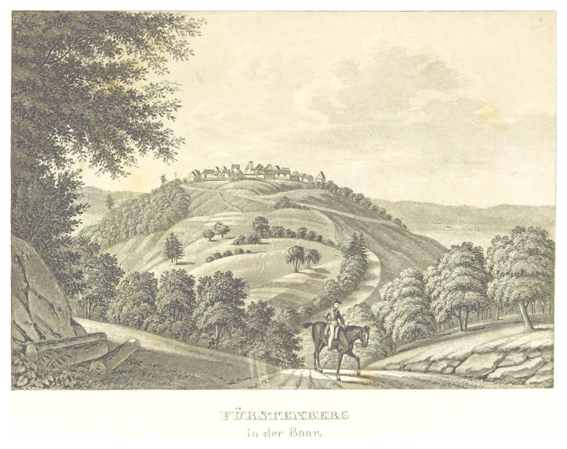 Das süddeutsche Hochadelsgeschlecht der Fürstenberger ist bis in das 11. Jahrhundert n.Chr. zurückzuverfolgen. Ihr Stammsitz lag auf dem 900 m hohen Fürstenberg, dem "fürdersten Berg", wo im Schatten der Burg bald eine Stadt entstand. Erst ein vernichtendes Schadensfeuer am Morgen des 18. Juli 1841 machte ihrer Existenz ein Ende.